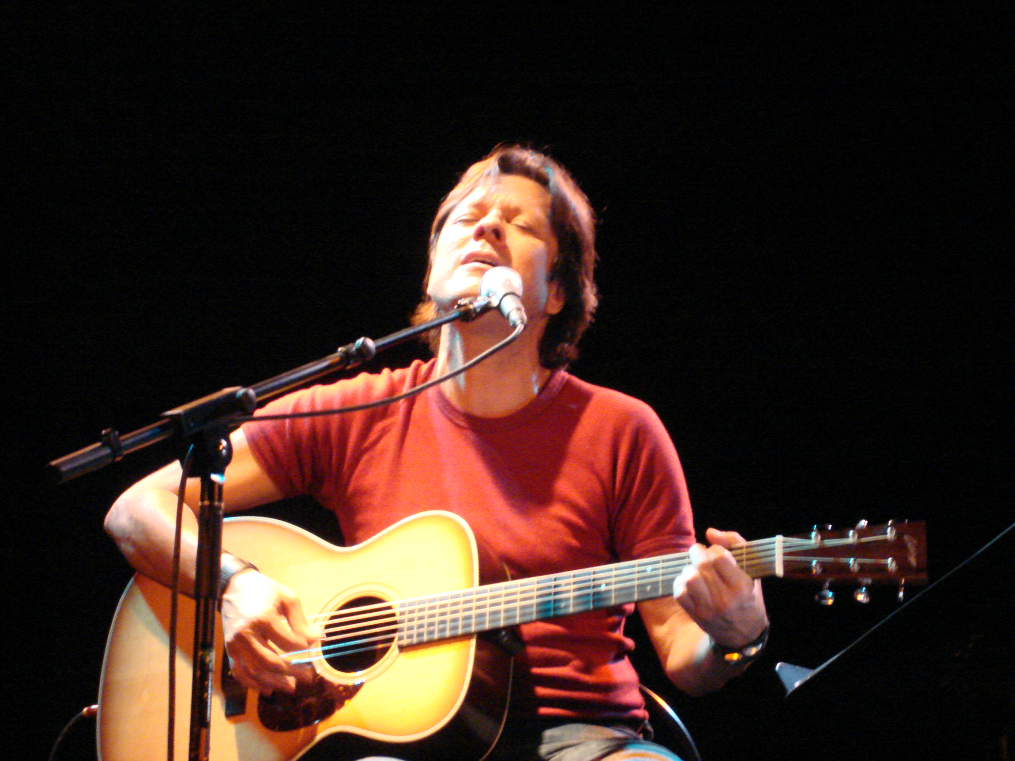 Hernaldo Zúñiga en concierto